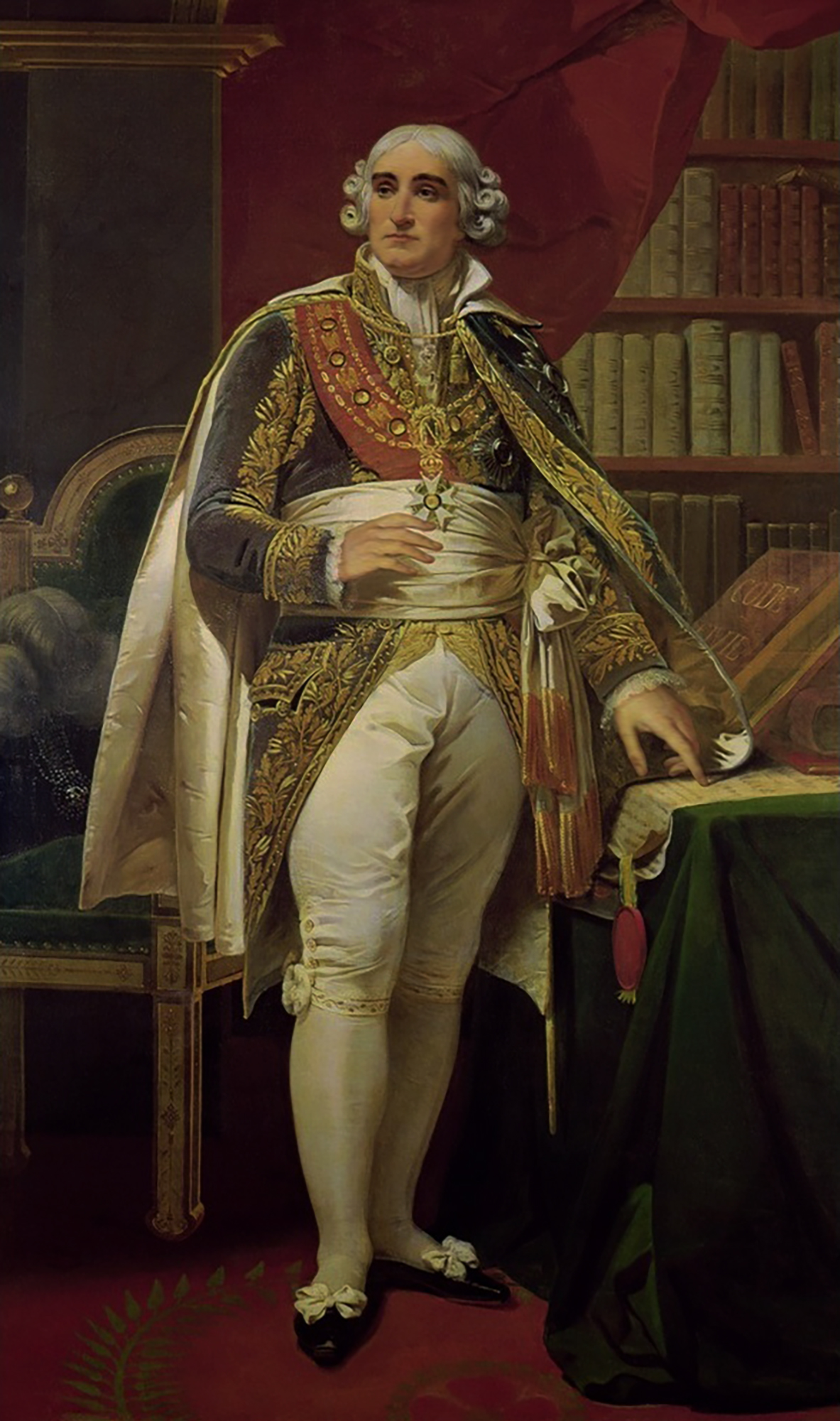 Portrait de Jean-Jacques-Régis de Cambacérès, duc de Parme, duc de Cambacérès, Archichancelier de l'Empire, est un homme politique français, né le 18 octobre 1753, à Montpellier et mort le 8 mars 1824 à Paris. En mars 1808, Napoléon rétablit par décret le droit aux armoiries pour la noblesse sous le strict contrôle du conseil d’Etat avec Cambacérès, président du « conseil du sceau » pour l’attribution des titres réservés aux barons du conseil d’Etat, aux comtes ministres, aux barons des corps administratifs et enfin aux membres de la Maison de l’empereur et des villes.